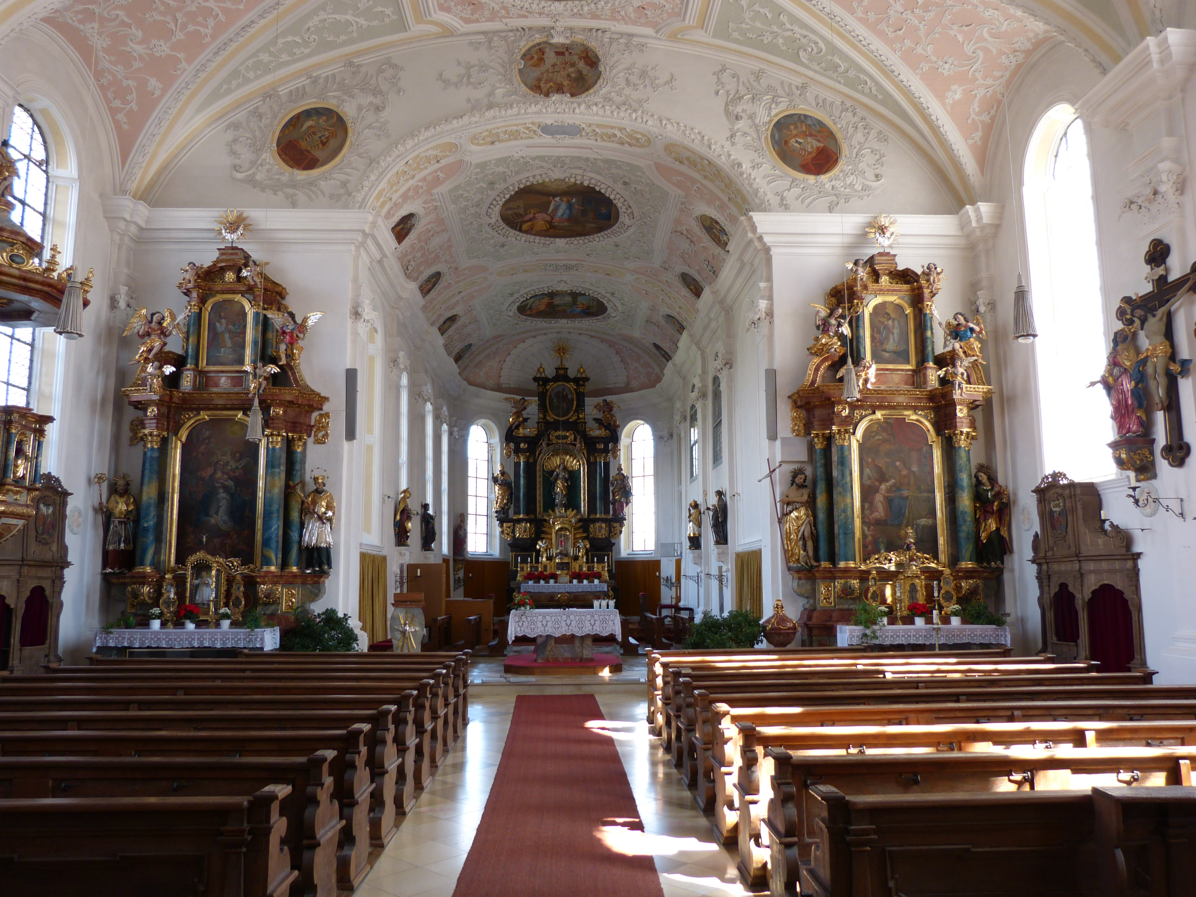 St. Martin in Boos, Landkreis Unterallgäu, Bayern